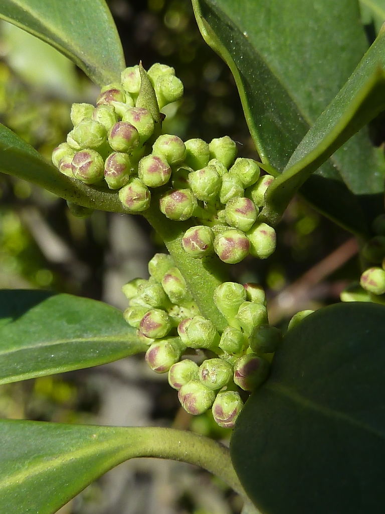 Ilex aquifolium (Acebo) : Cima de flores femeninas en pre-antesis, C./María de Molina con Serrano, cultivado, Madrid (España).